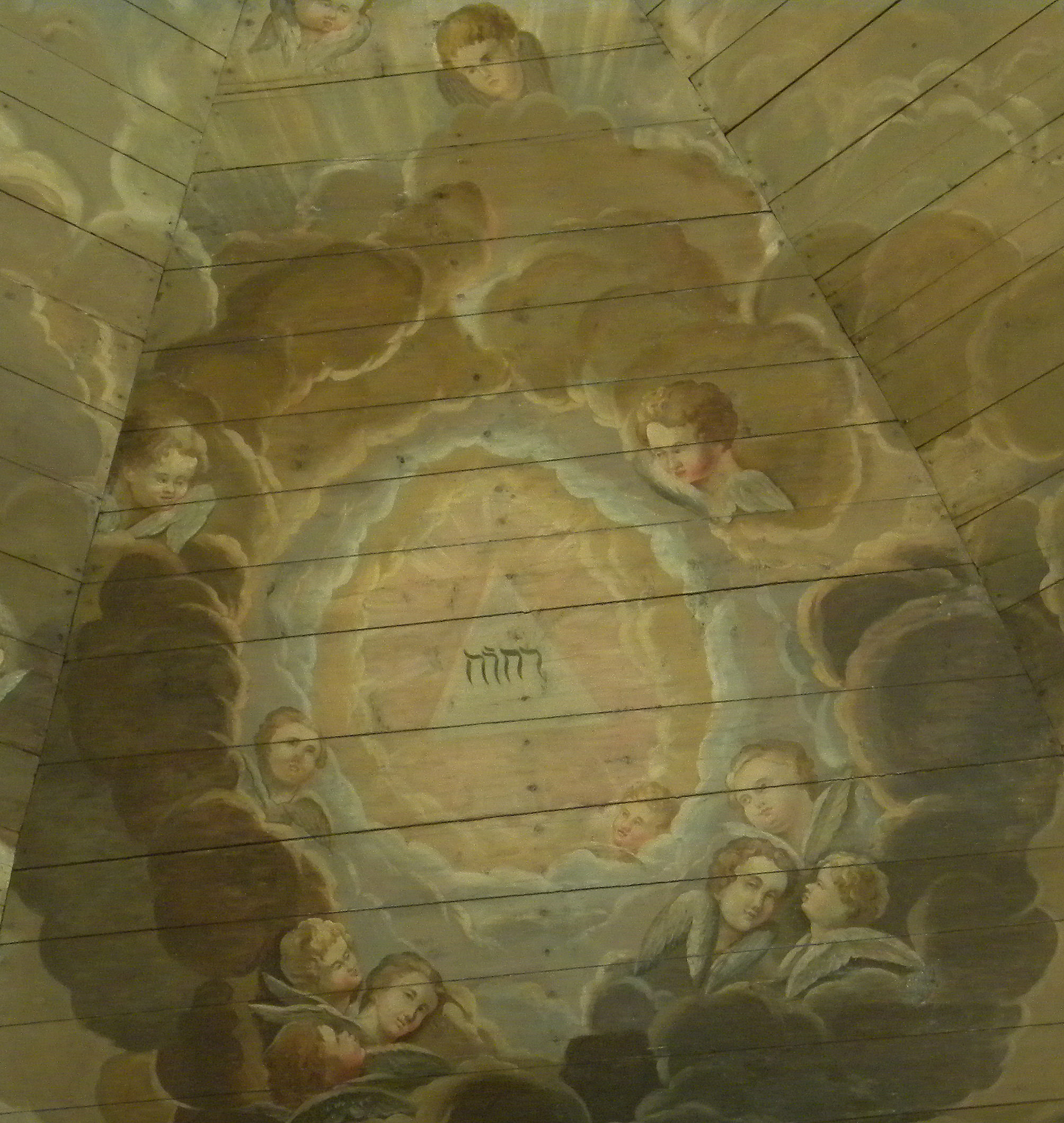 Takmålning från 1700-talet med tetragrammet JHWH i Landvetters kyrka